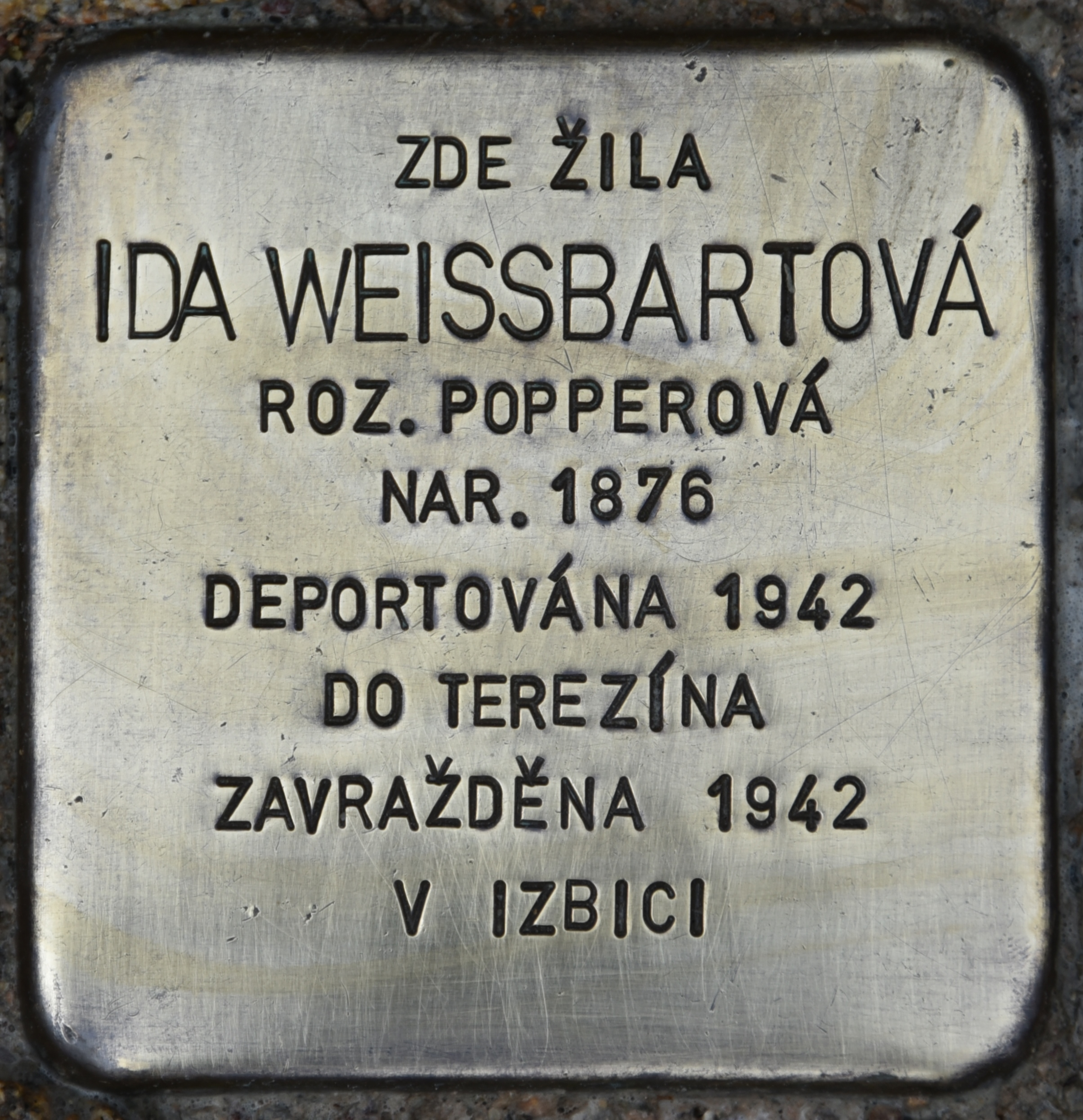 Stolperstein für Ida Weissbartova